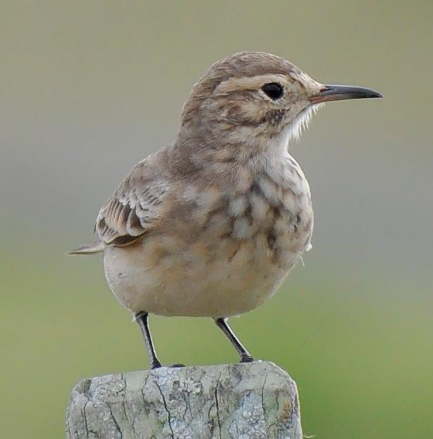 Geositta cunicularia subsp. cunicularia photographed in Rio Grande do Sul, Brazil, in May 2010.